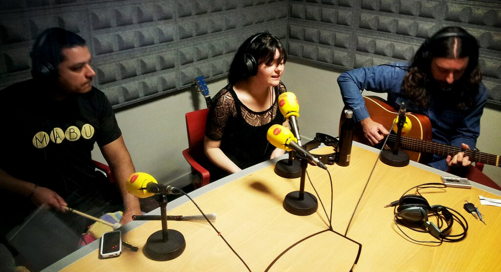 Foto tomada al grupo Mäbu durante su estancia en CabinaPOP.